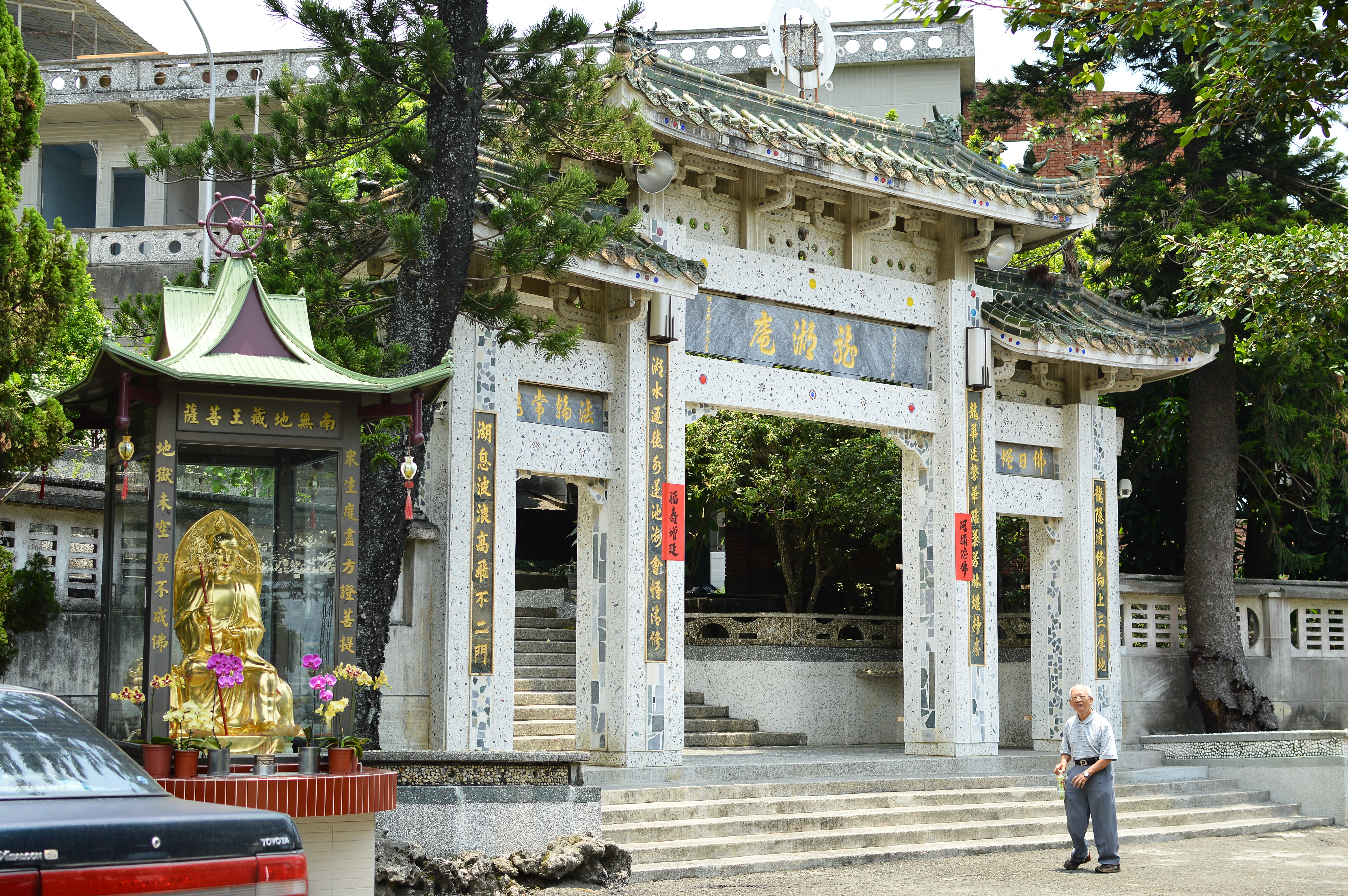 高雄阿蓮大崗山龍湖庵牌樓2017